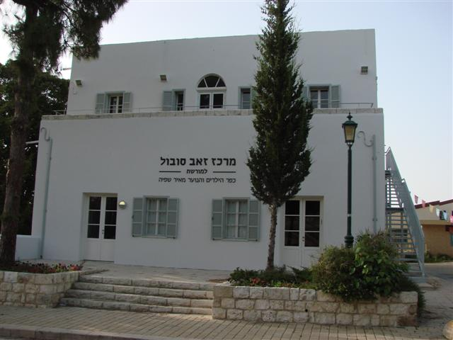 מאיר שפיה - בית הפקידות